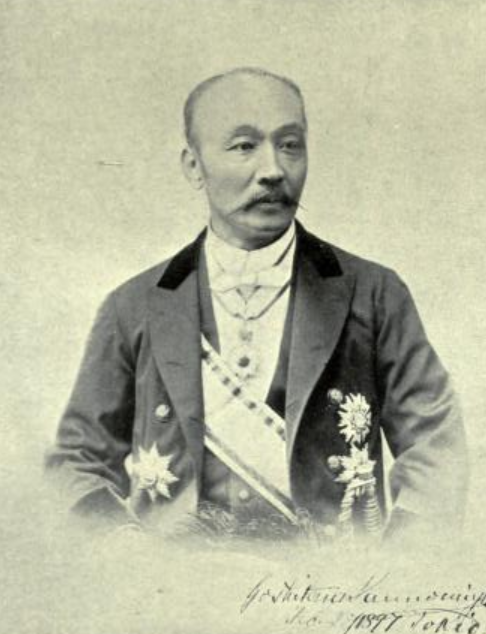 洋装の三宮義胤